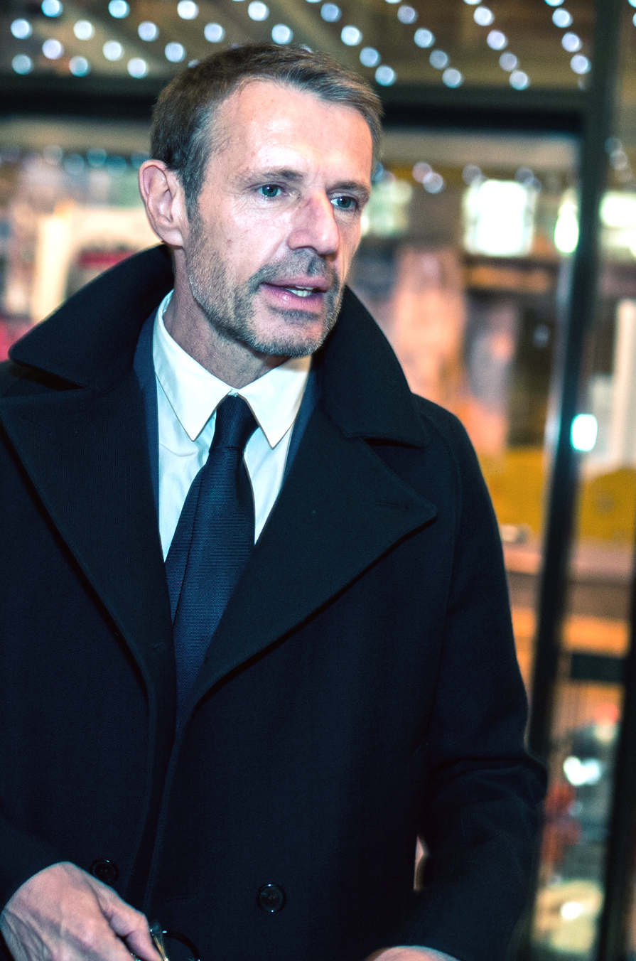 Lambert Wilson CINEMANIA 2014